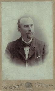 De Pierre Olinger (1864-1942), Foto vum Charles Bernhoeft